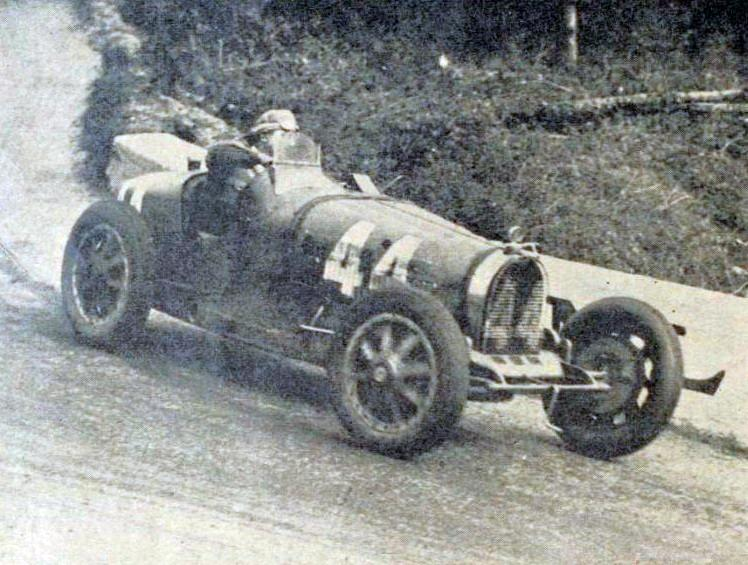 Philippe Étancelin, vainqueur du Grand Prix de l'ACF 1930 sur Bugatti 2L.